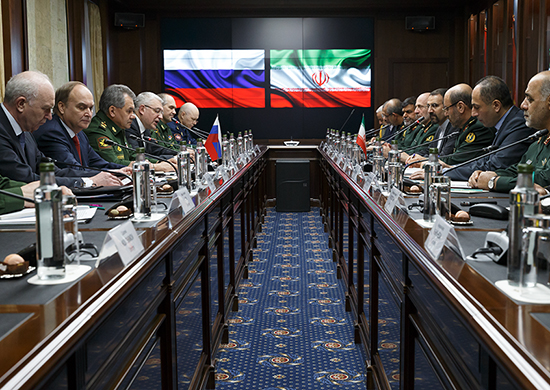 Встреча Министра обороны Российской Федерации генерала армии Сергея Шойгу с Министром обороны Ирана бригадным генералом Хосейном Дехканом